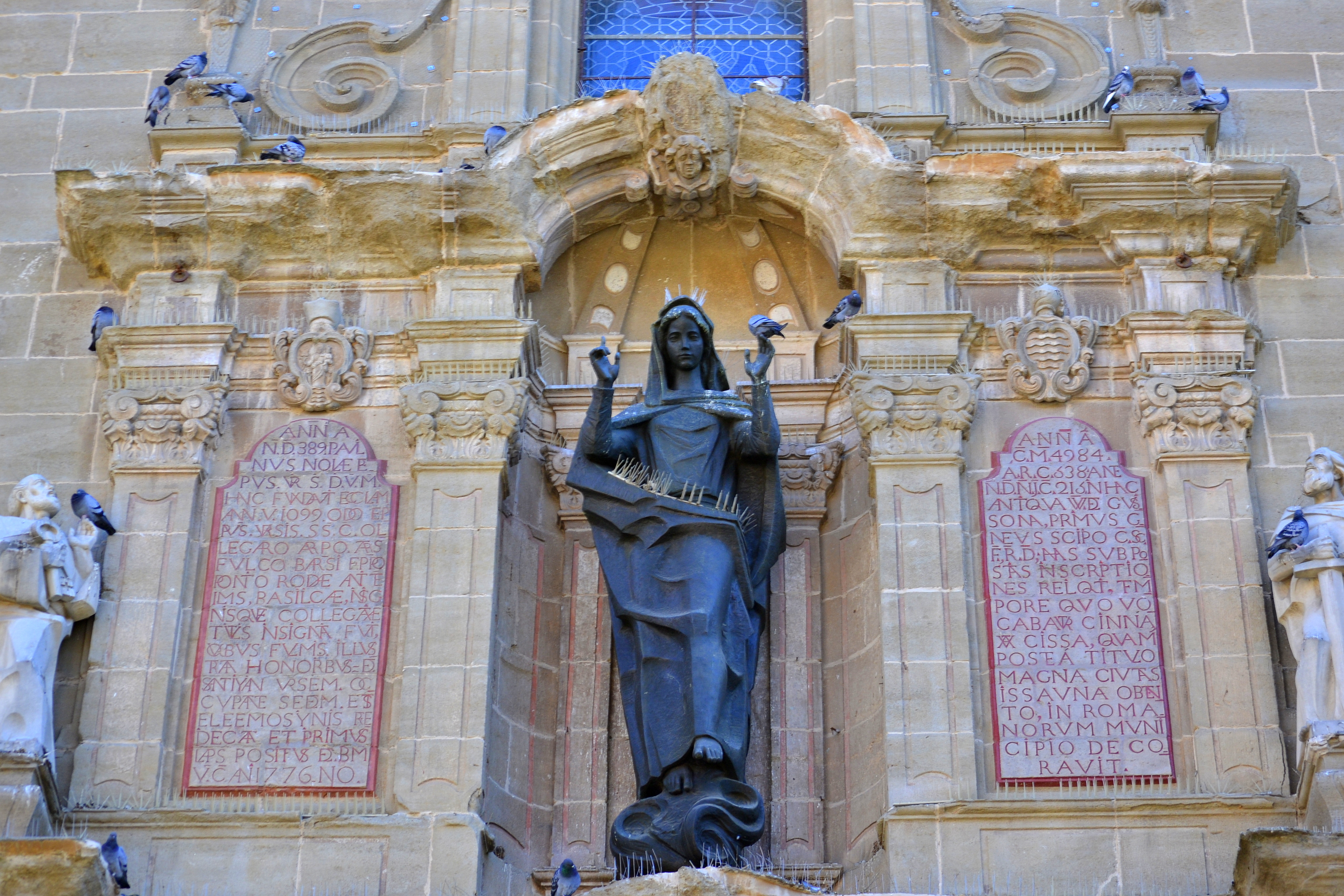 Església de Santa Maria de Guissona